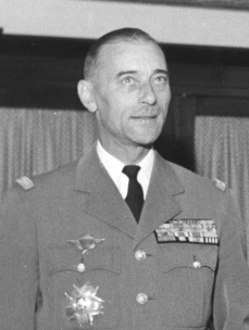 Le général André Demetz